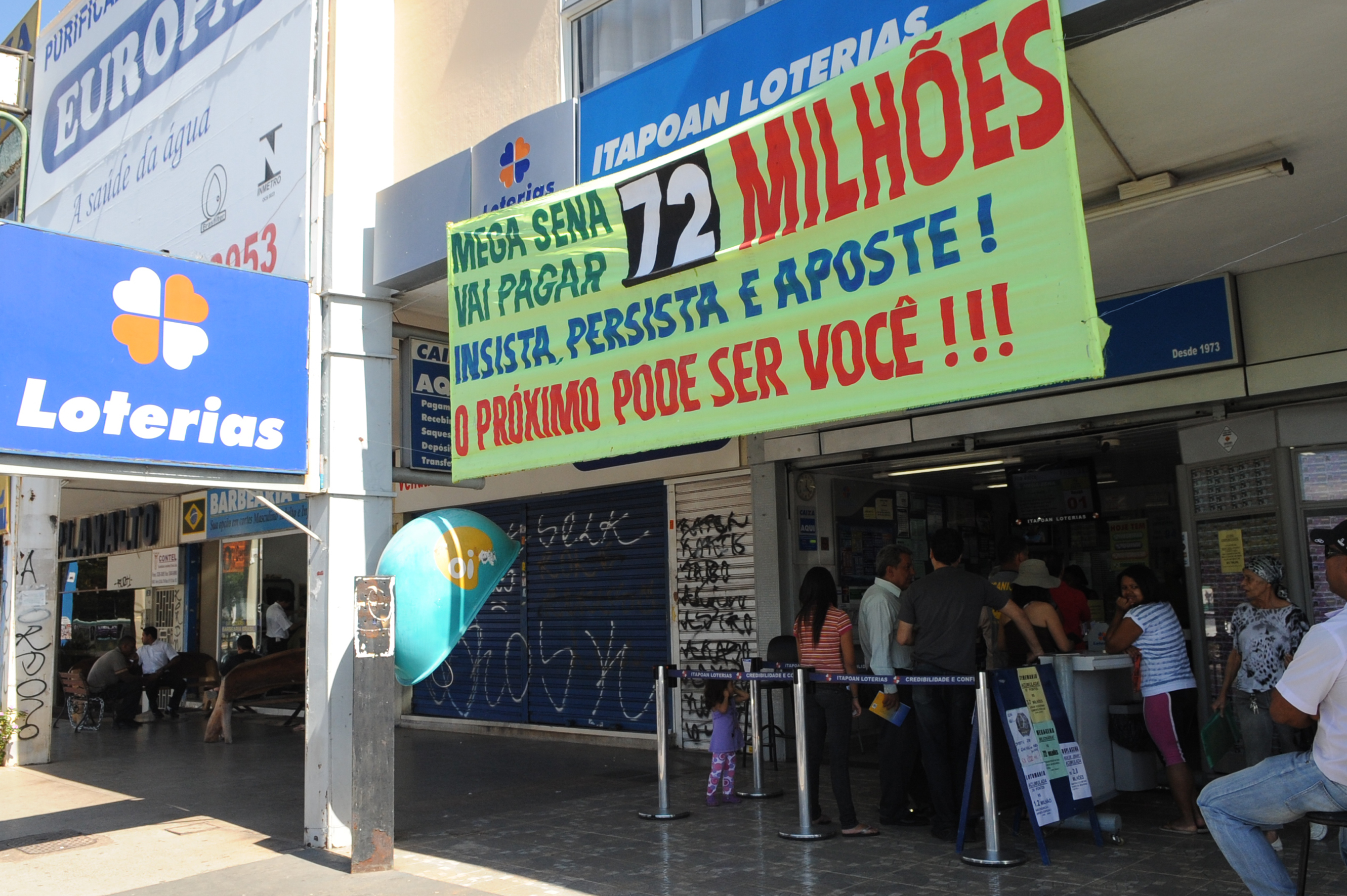 Brasília - Apostadores procuram as casas lotéricas para jogar na Mega Sena, que deve pagar o maior prêmio do ano.